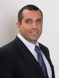 Gustavo Hasbún Selume